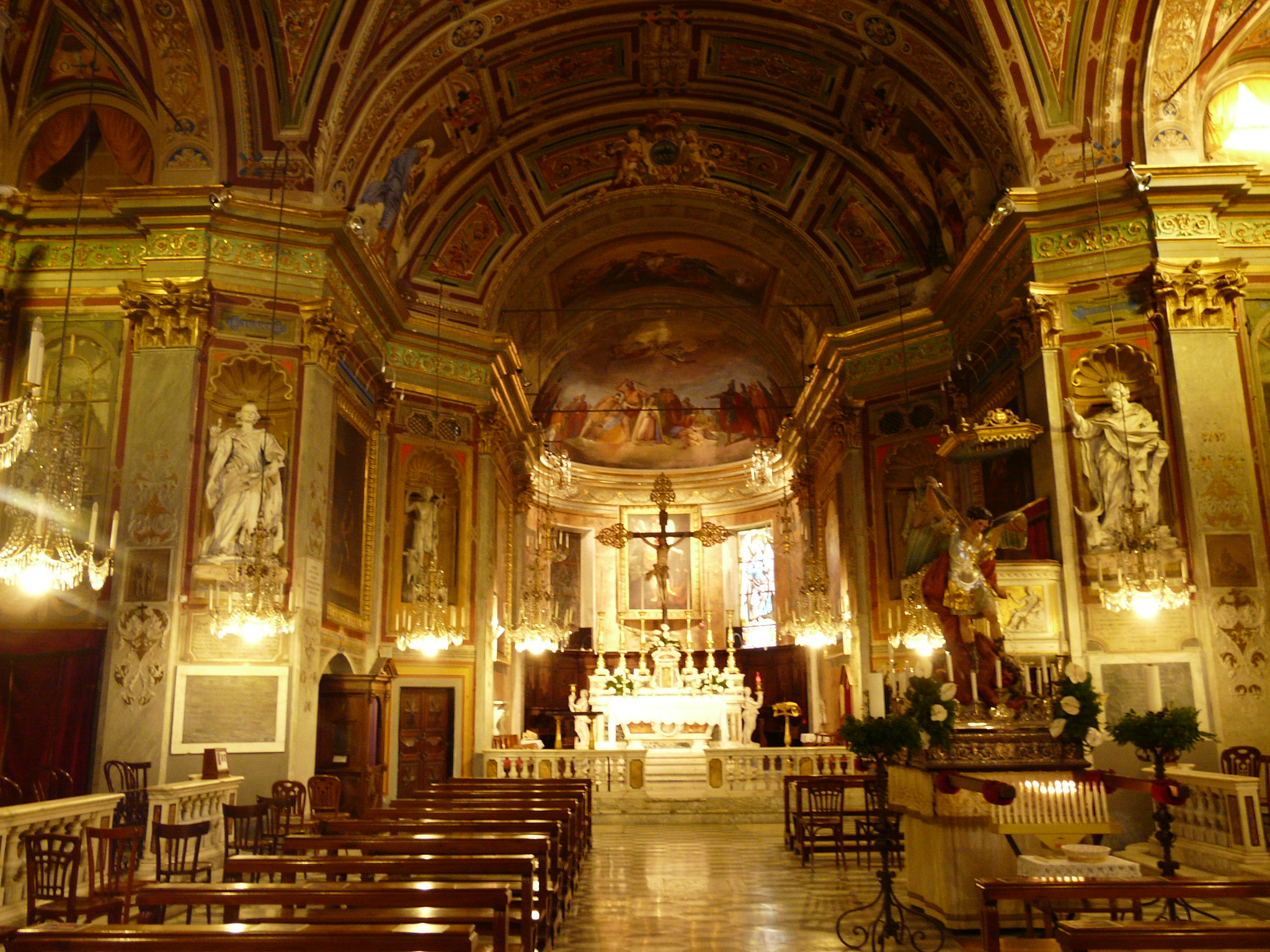 Interno della chiesa di San Michele arcangelo, San Michele di Pagana, Rapallo, Liguria, Italia